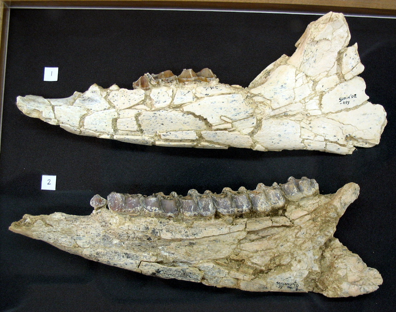 Mandíbulas de Anchitherium sp. del Yacimiento de Somosaguas (Madrid). Aragoniense Medio (Mioceno continental)